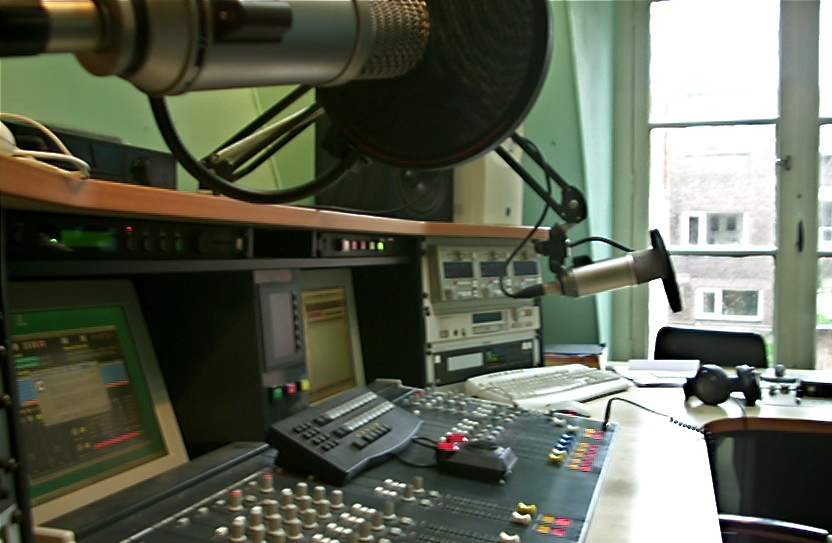 De studio van Hofstad Radio aan het Achterom in 2003/2004